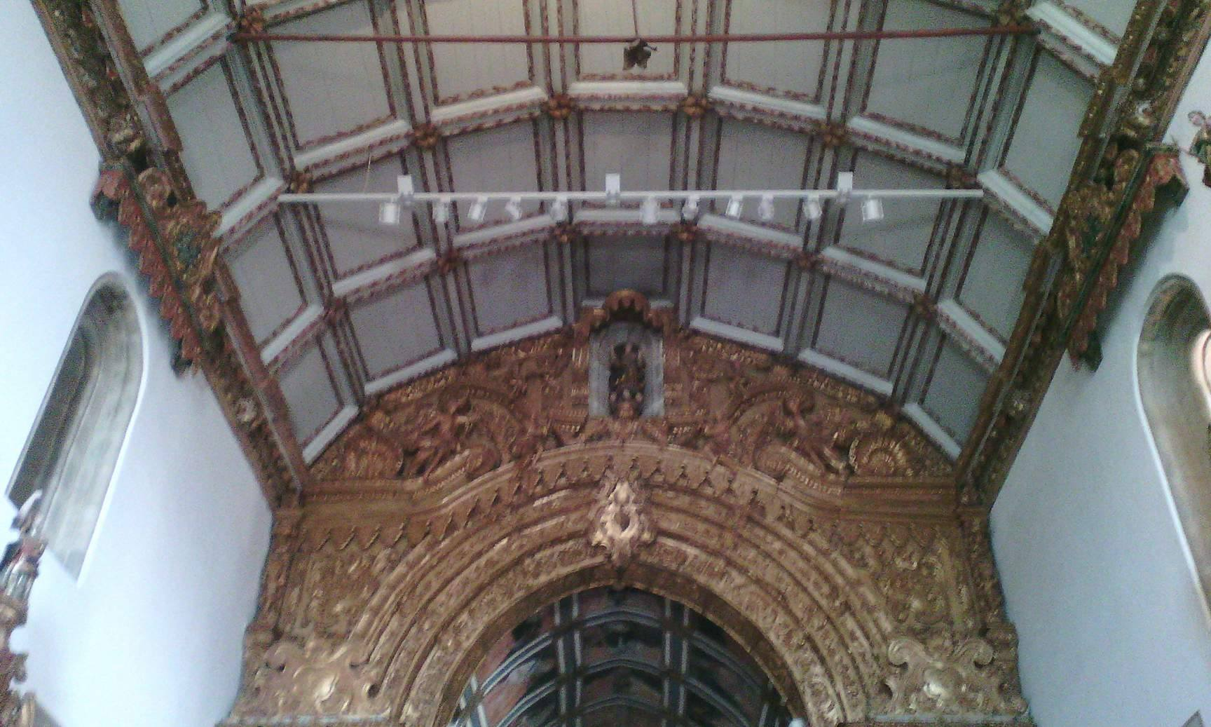 Pormenor da nave central onde se encontra Santa Maria também conhecida como Senhora da Assunção